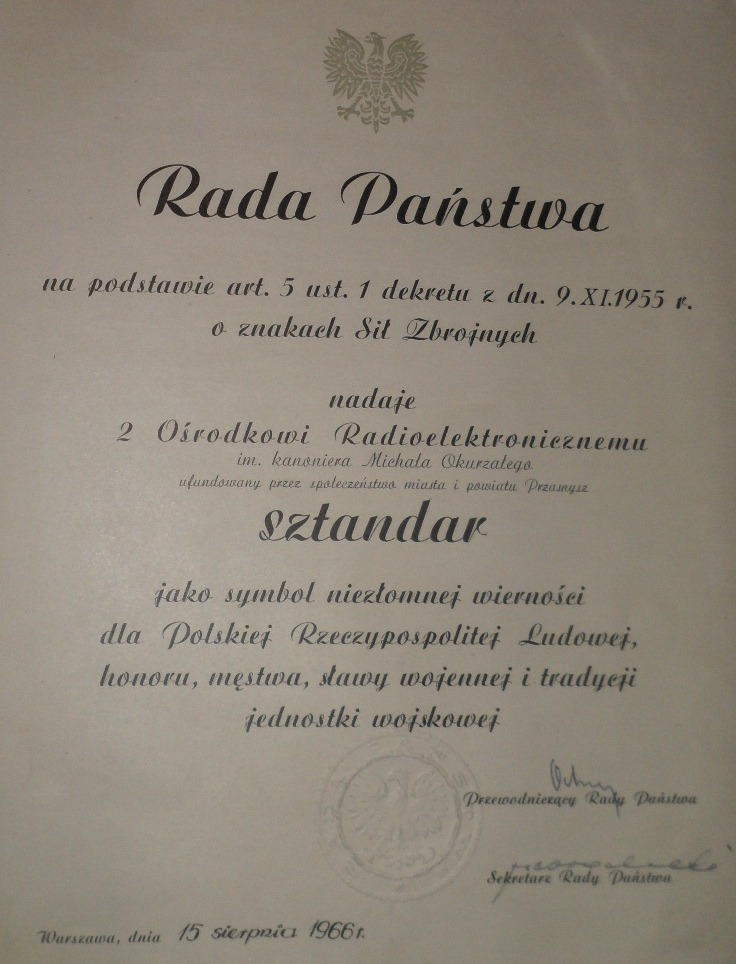 Akt ufundowania sztandaru dla 2 ORel